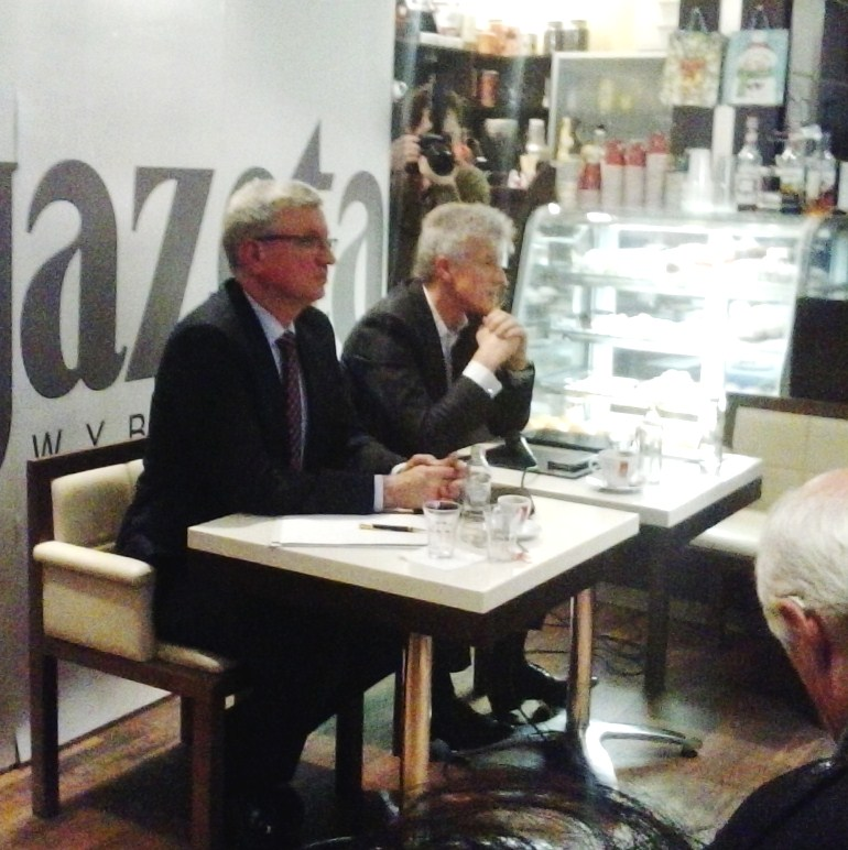 Debata przed wyborami na Prezydenta Poznania - 25.11.2014r. Cafe Wyborcza.